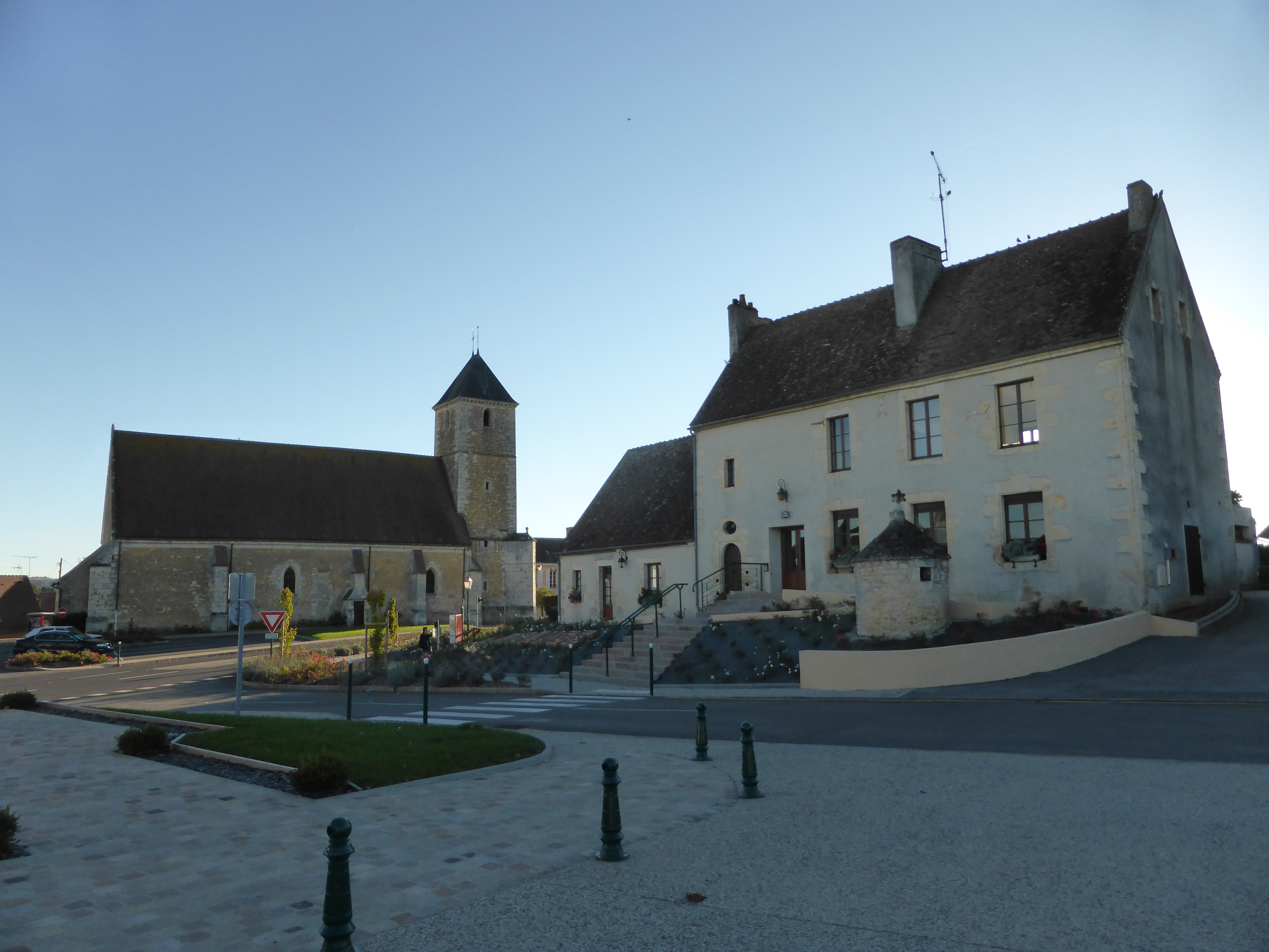 Église Saint-Rémi et salle municipale de La Rouge, dans l'Orne.